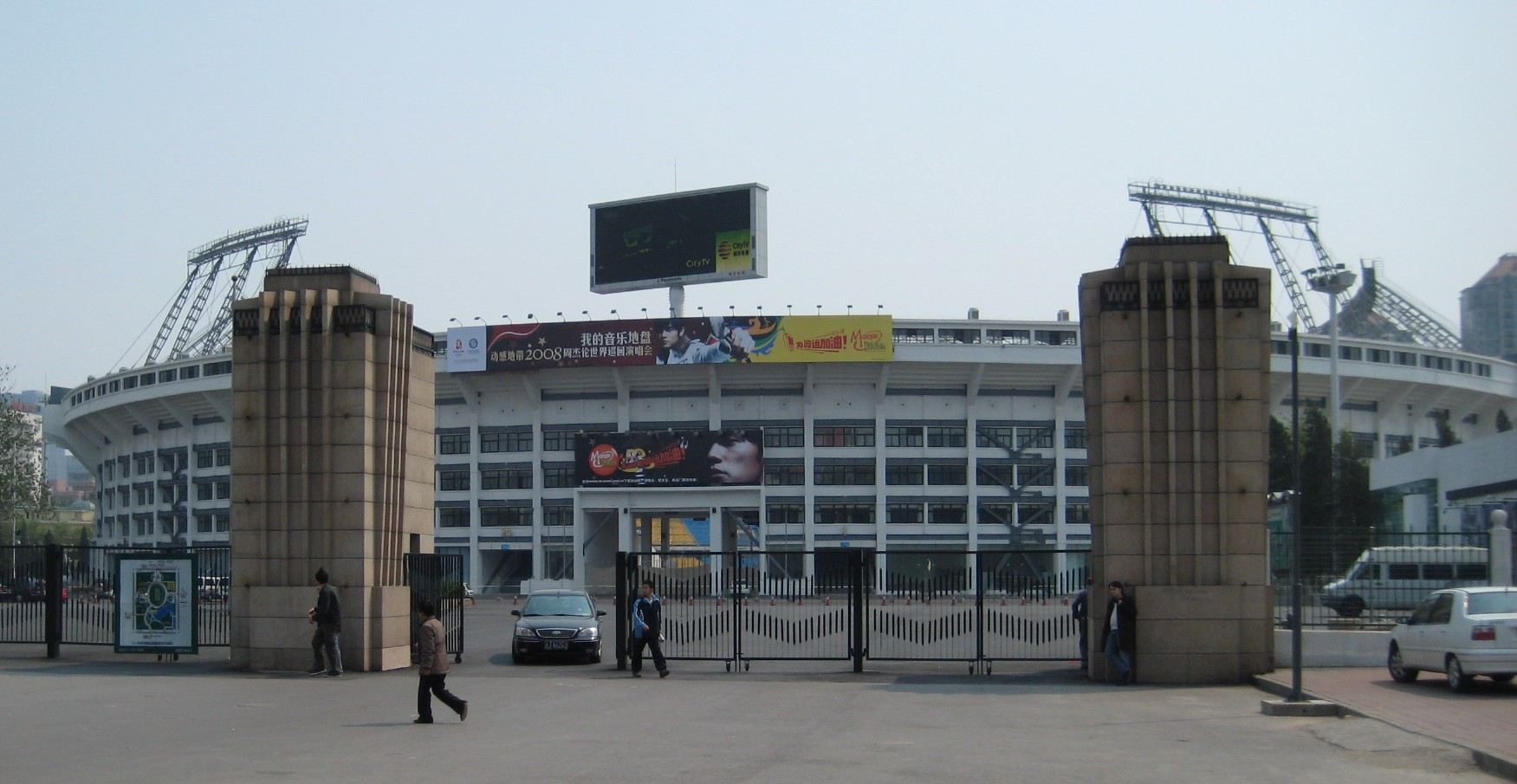 Workers Stadium in Beijing, China